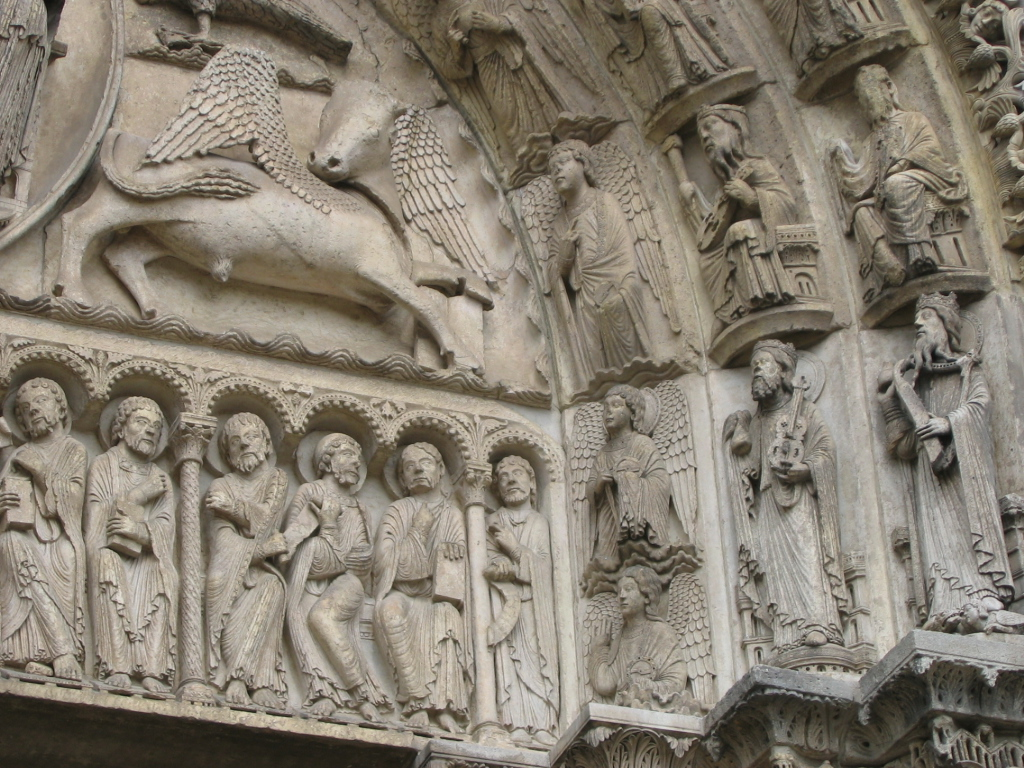 Portail central du porche occidental de la cathédrale de Chartres